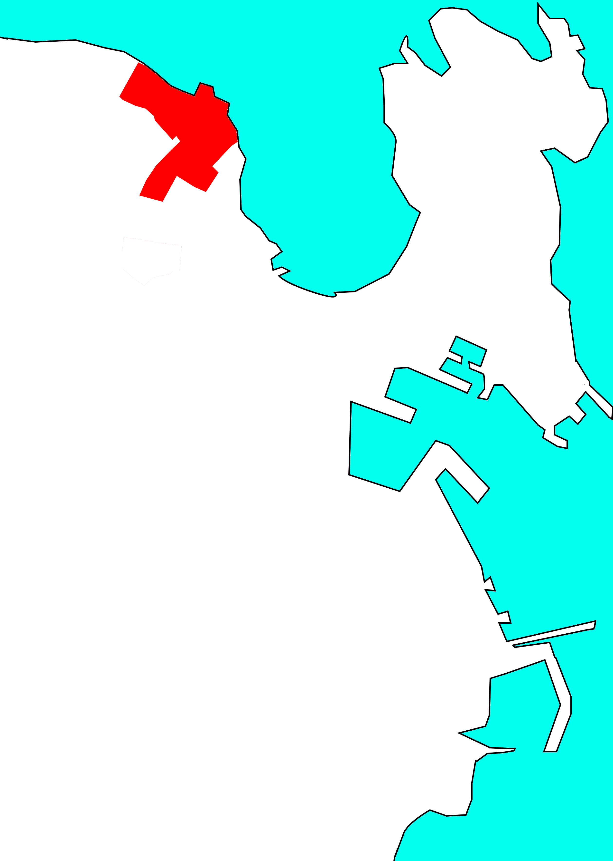 Situación de Labañou no concello da Coruña.[1]